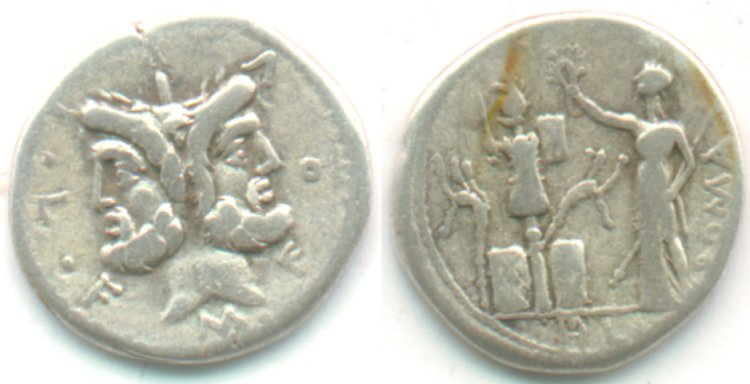 Denario (3,7 g) Moneda de plata acuñada en Roma (119 a.C.) por Marcus Furius L.f. Philus Anverso: cabeza laureada de "Jano". Alrededor de la cabeza figura la leyenda: Marci. FOVRIi. Lucii. Filii. Reverso: alegoría de Roma estante, a la derecha, corona un trofeo con su mano derecha y sostiene un cetro con la izquierda. En la parte baja hay dos escudos y dos carnix. Leyenda ROMA a la derecha del campo. Exergo: PHiLI Con la inclusión de Jano, la famosa divinidad de las dos caras, se abandona radicalmente el tradicional motivo de Roma (Minerva) en los denarios. Las diversas armas galas, carnix y escudos que aparecen en este reverso, recuerdan las victorias obtenidas en 121 a.C, sobre los galos ligures, por Cn. Domitius Ahenobarbus y Q. Fabius Maximus, en las que participó un ascendiente de este emisor, el cónsul Publio Furio Filo.